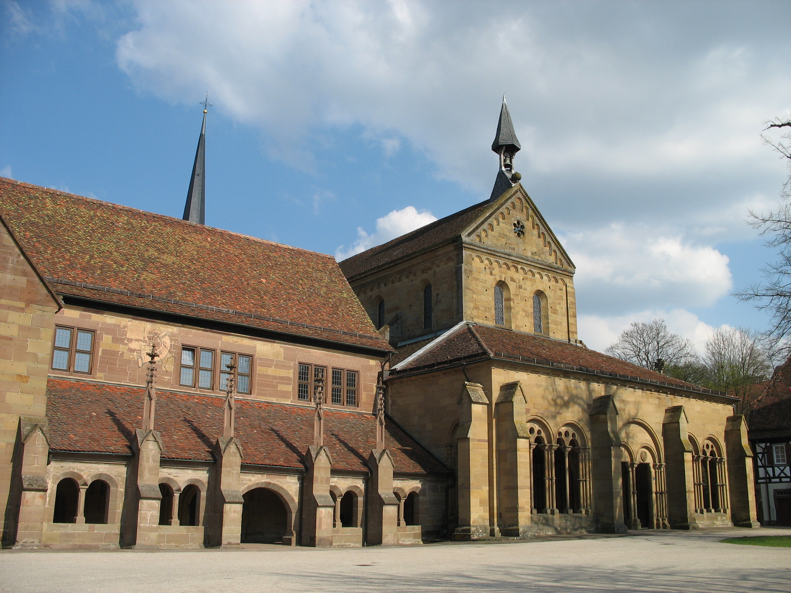 Kloster Maulbronn, Vorderseite der Klosterkirche